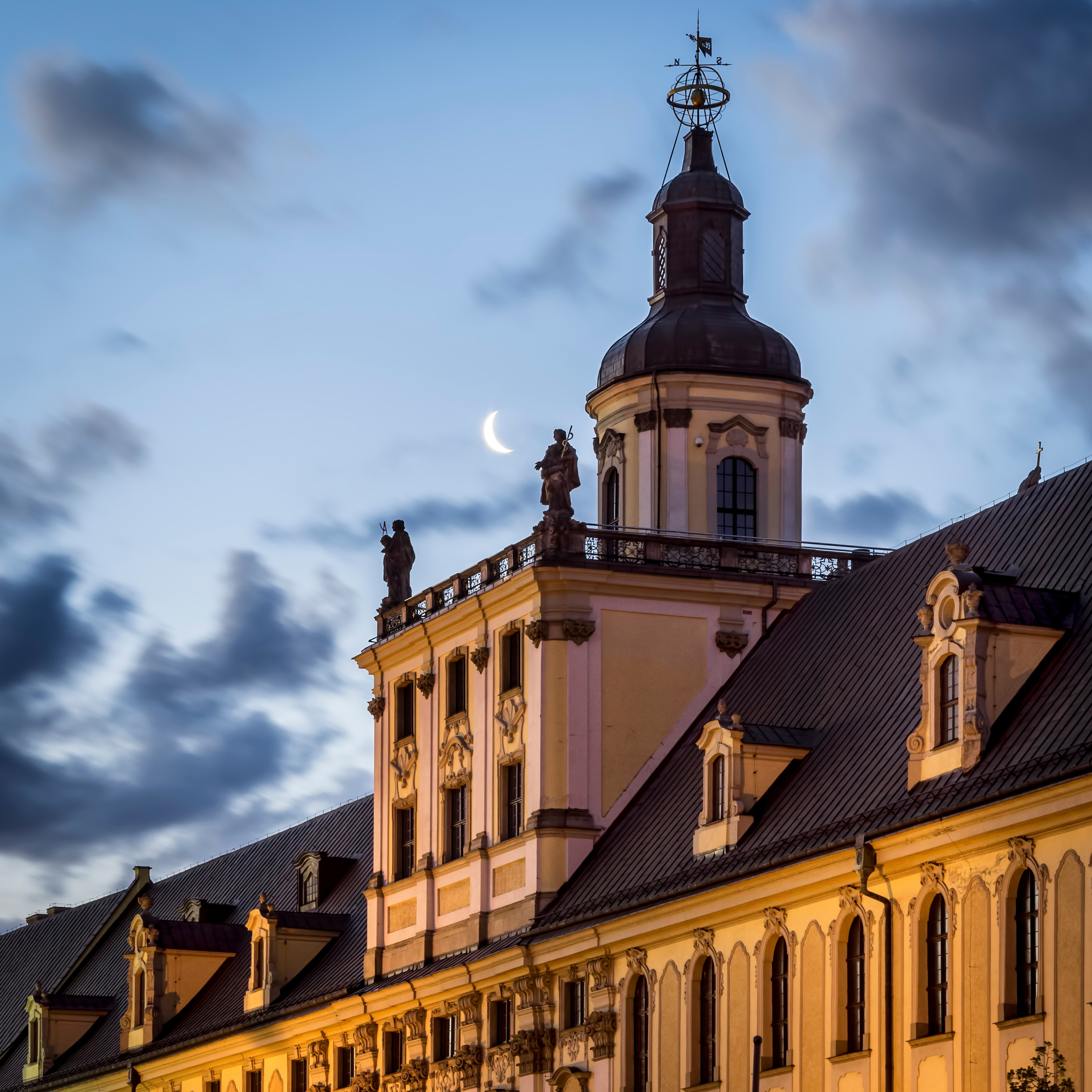 Wrocław, kolegium jezuickie, ob. Uniwersytet Wrocławski